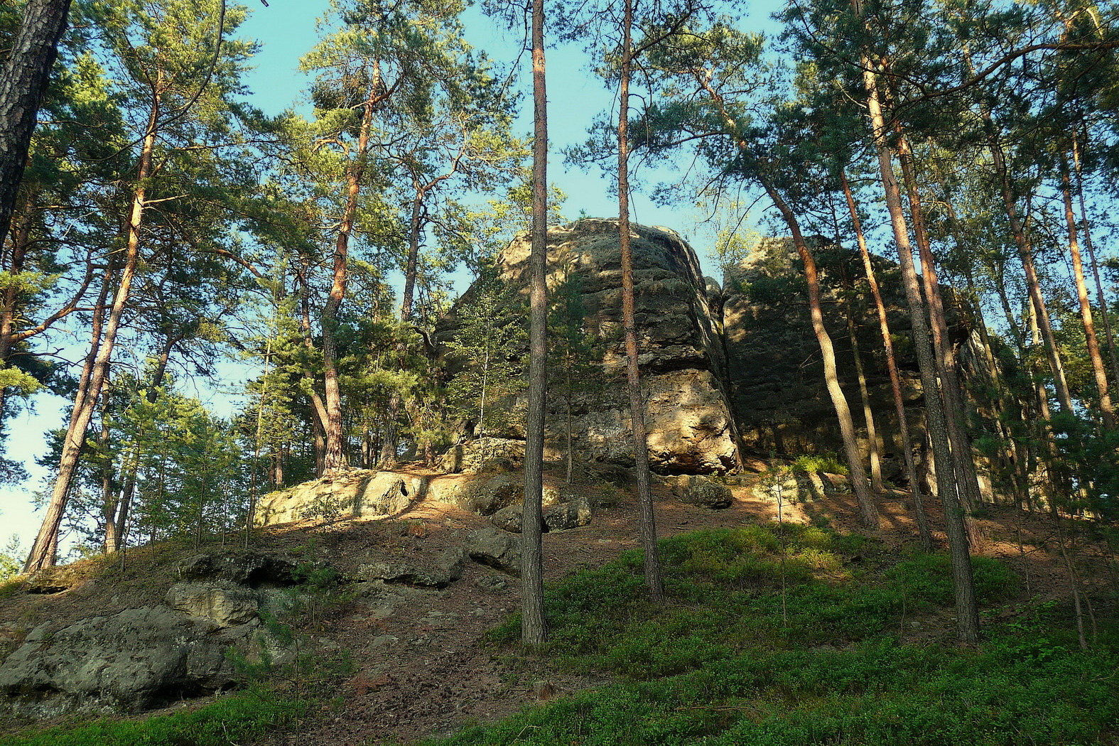 Pod Královým stolcem